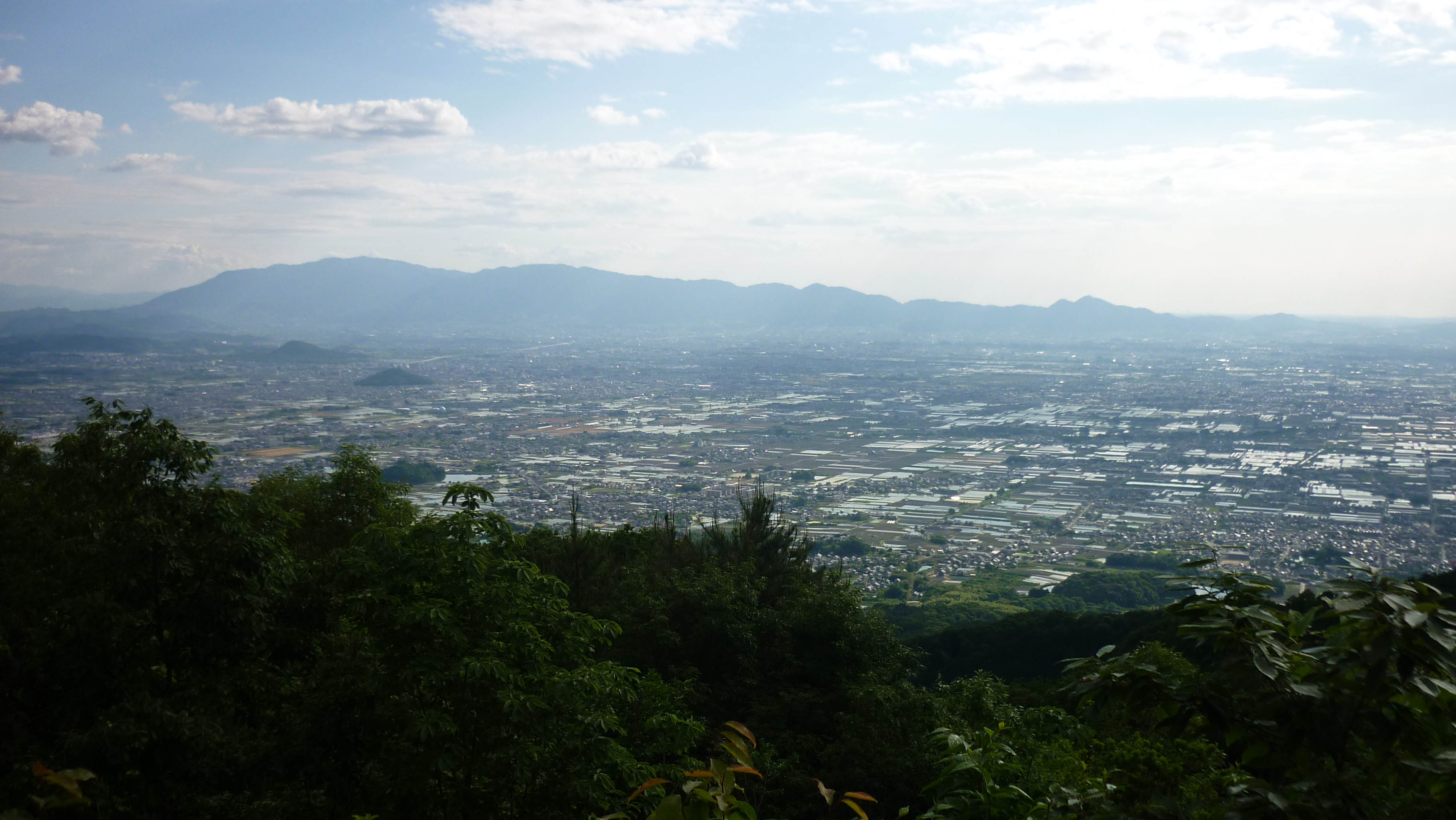 本丸からの眺望